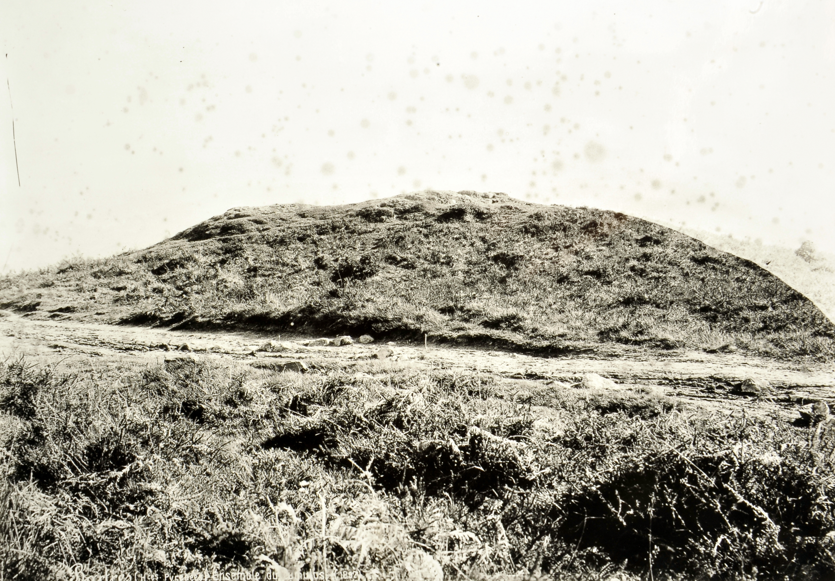 Bartrès. – Tumulus de la Halliade / [Médéric Mieusement ?]. – 1892. – 1 photogr. NB ; 24 × 30,5 cm. 7DRAC199